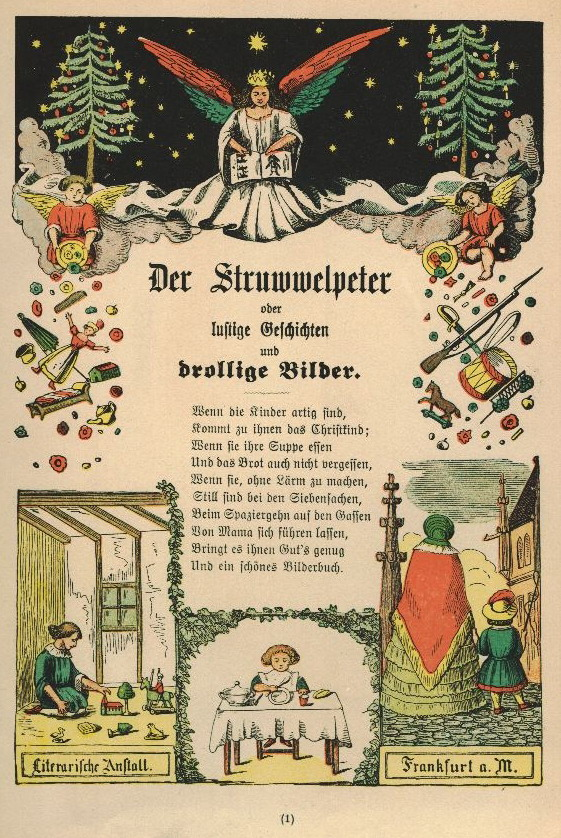 Der Struwwelpeter: Vorspruch